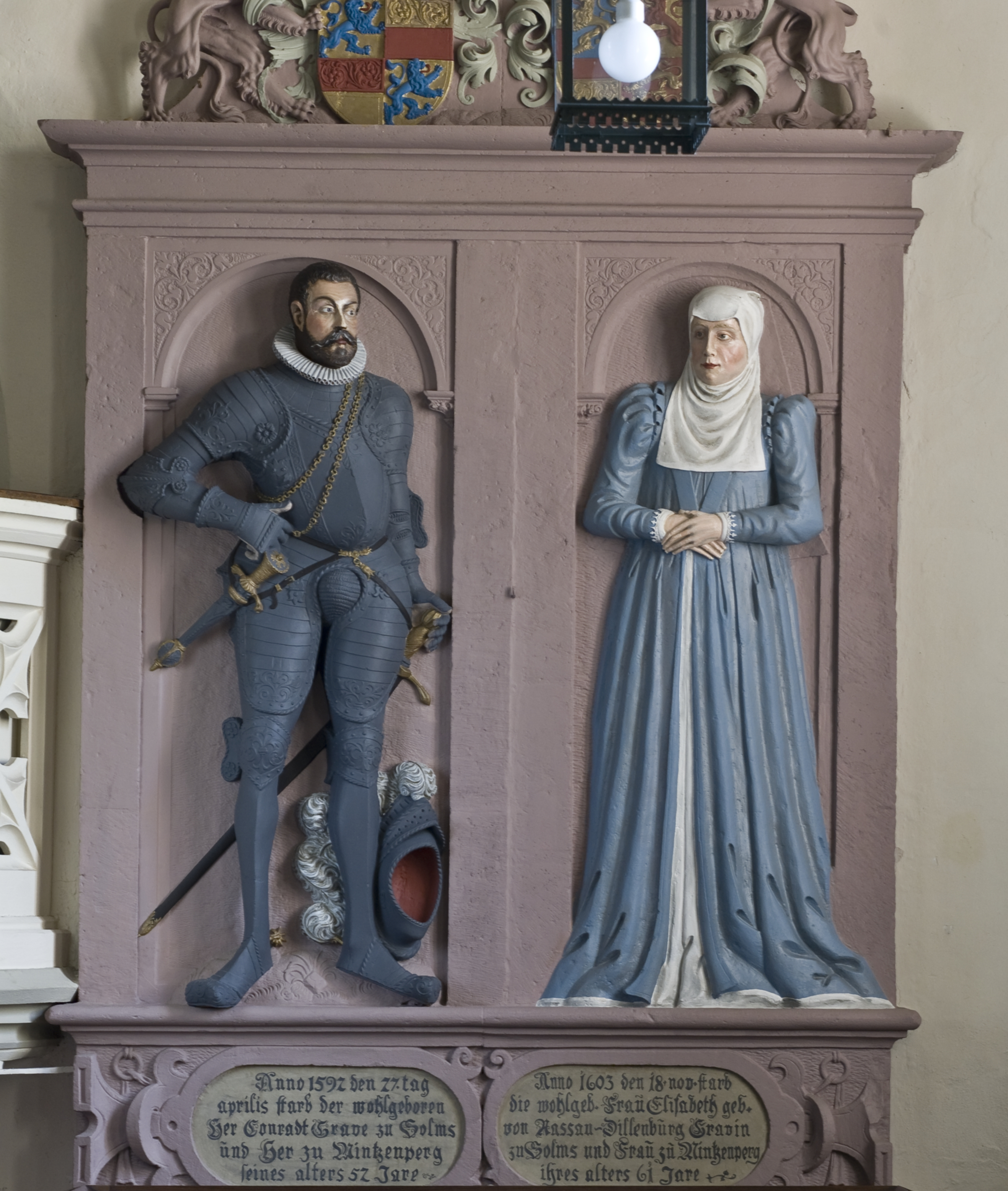 Schlosskirche (Braunfels)